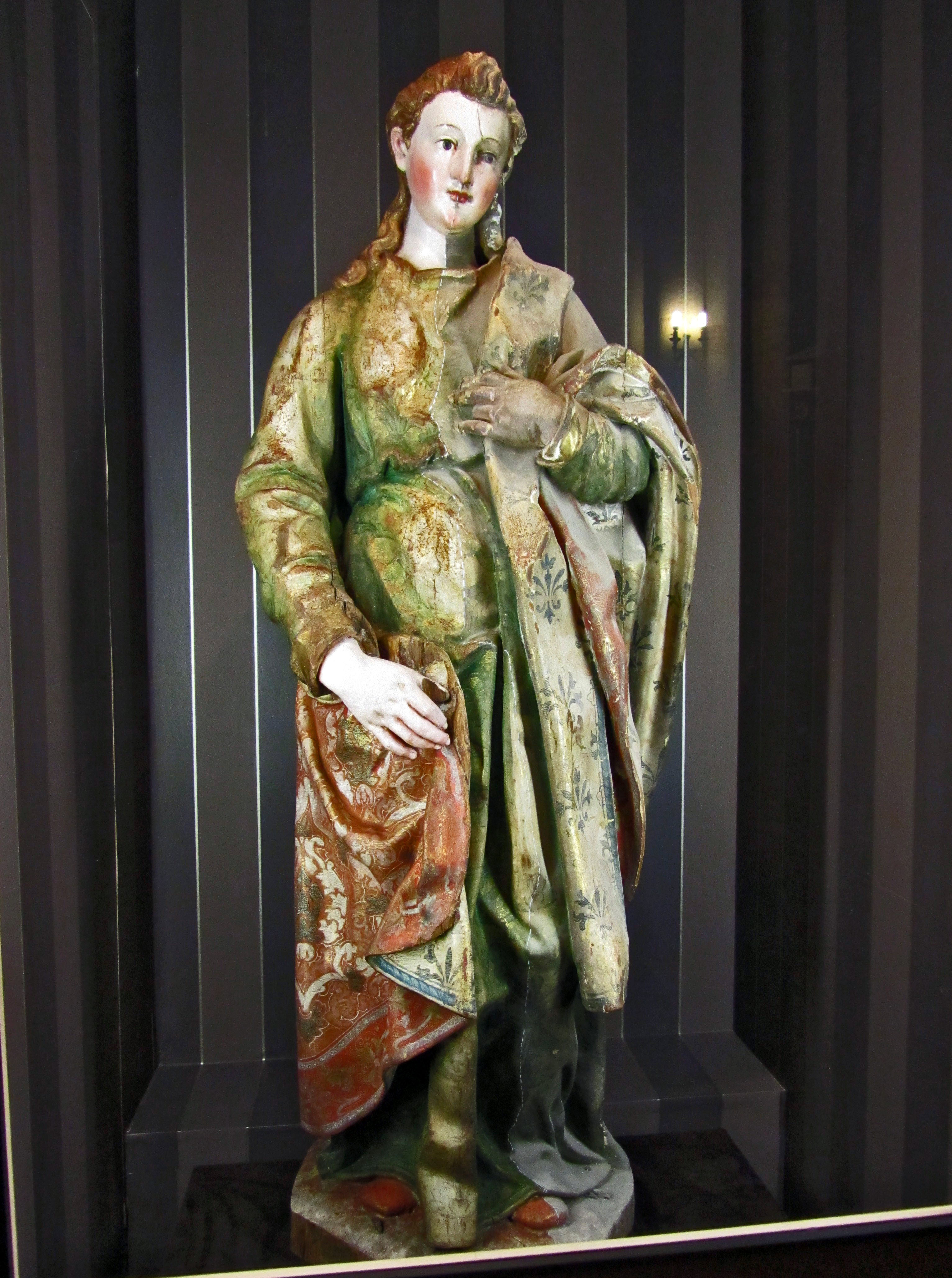 Imagen de Santa Librada del retablo mayor de la catedral de Sigüenza.Spain